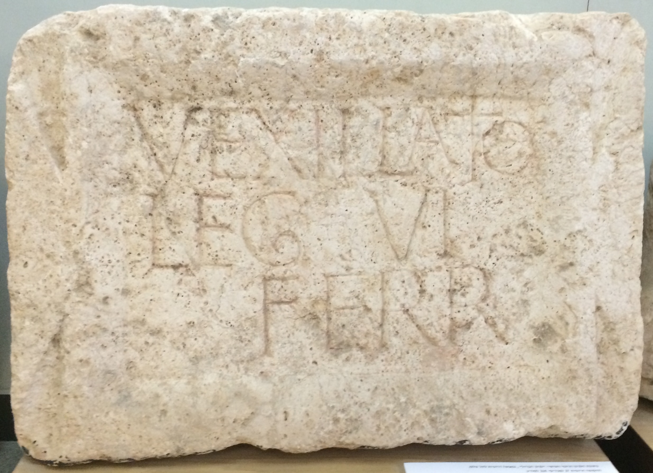 כתובת של הלגיון השישי פארטה שנמצאה בתל שלם ליד טירת צבי